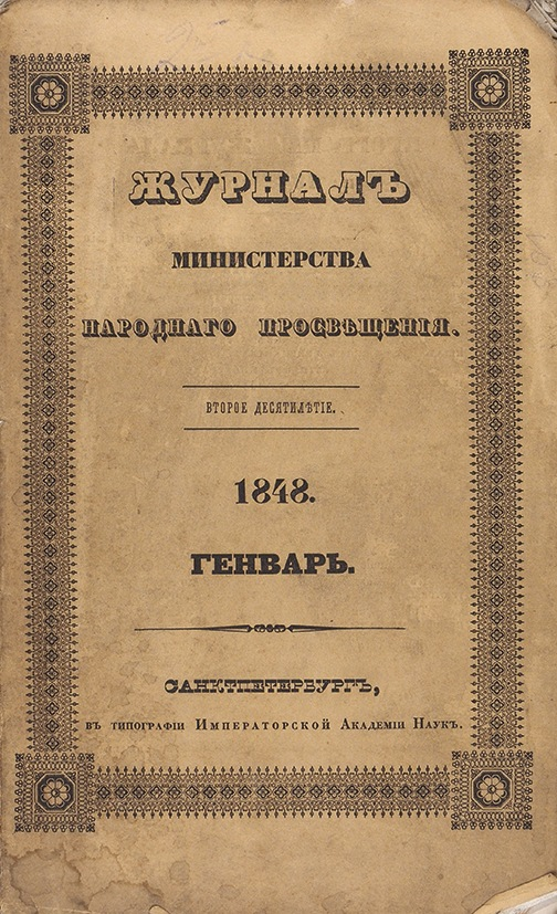 Журнал Министерства Народного Просвещения. Январь. СПб.: В тип. Императорской Академии Наук, 1848. 84, 32 с.; 1 л. ил. 23,4 х 14,3 см.